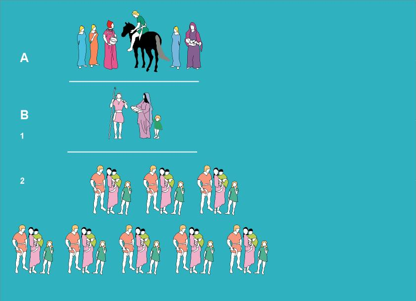 El Orden social en el Castellet de Bernabe